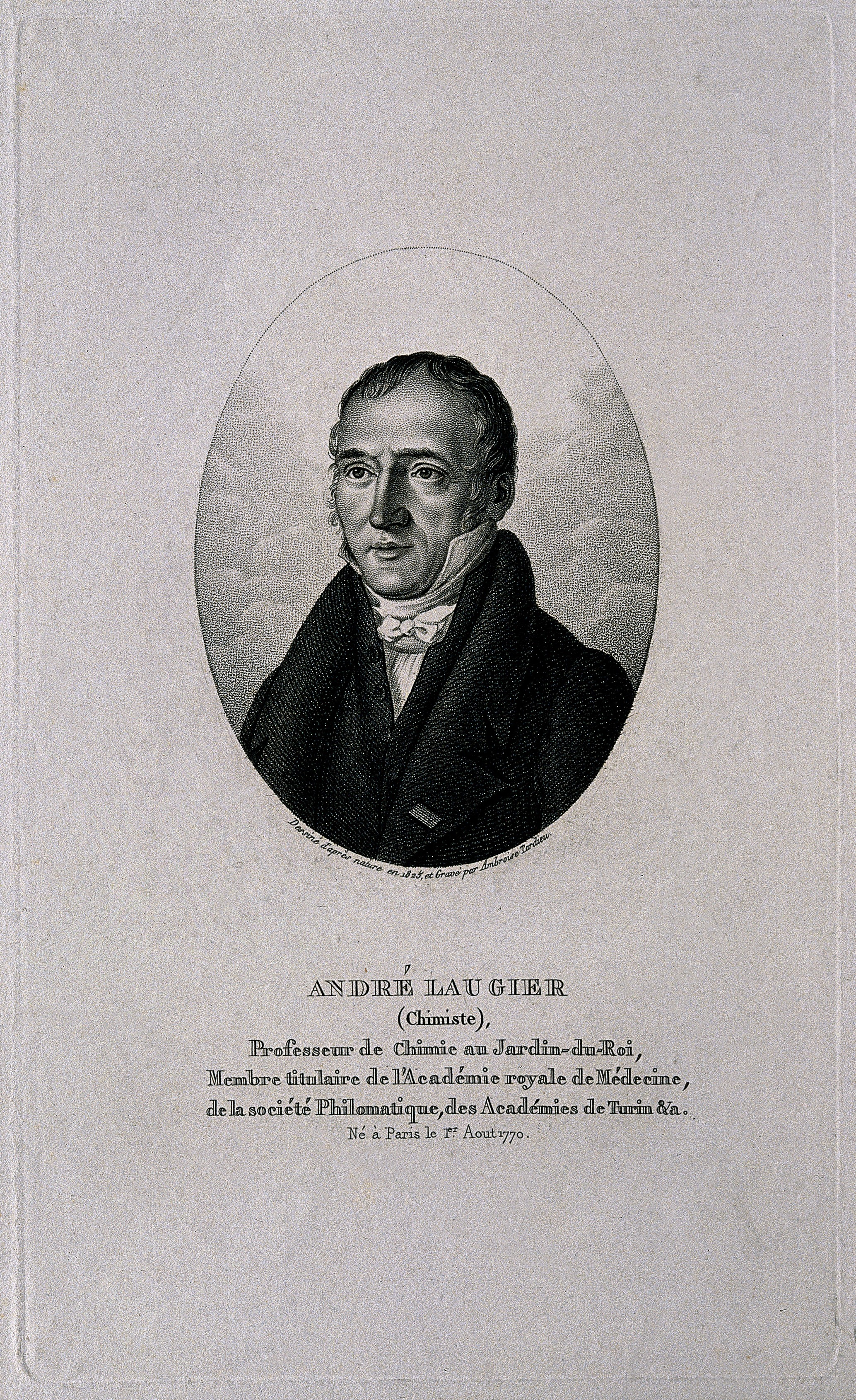 André Laugier. Stipple engraving by A. Tardieu, 1825, after himself. Iconographic Collections Keywords: portrait prints; Ambroise Tardieu; stipple prints; André Laugier